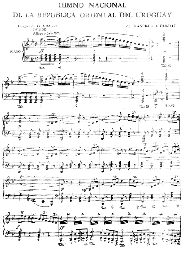 자료를 첨부함.